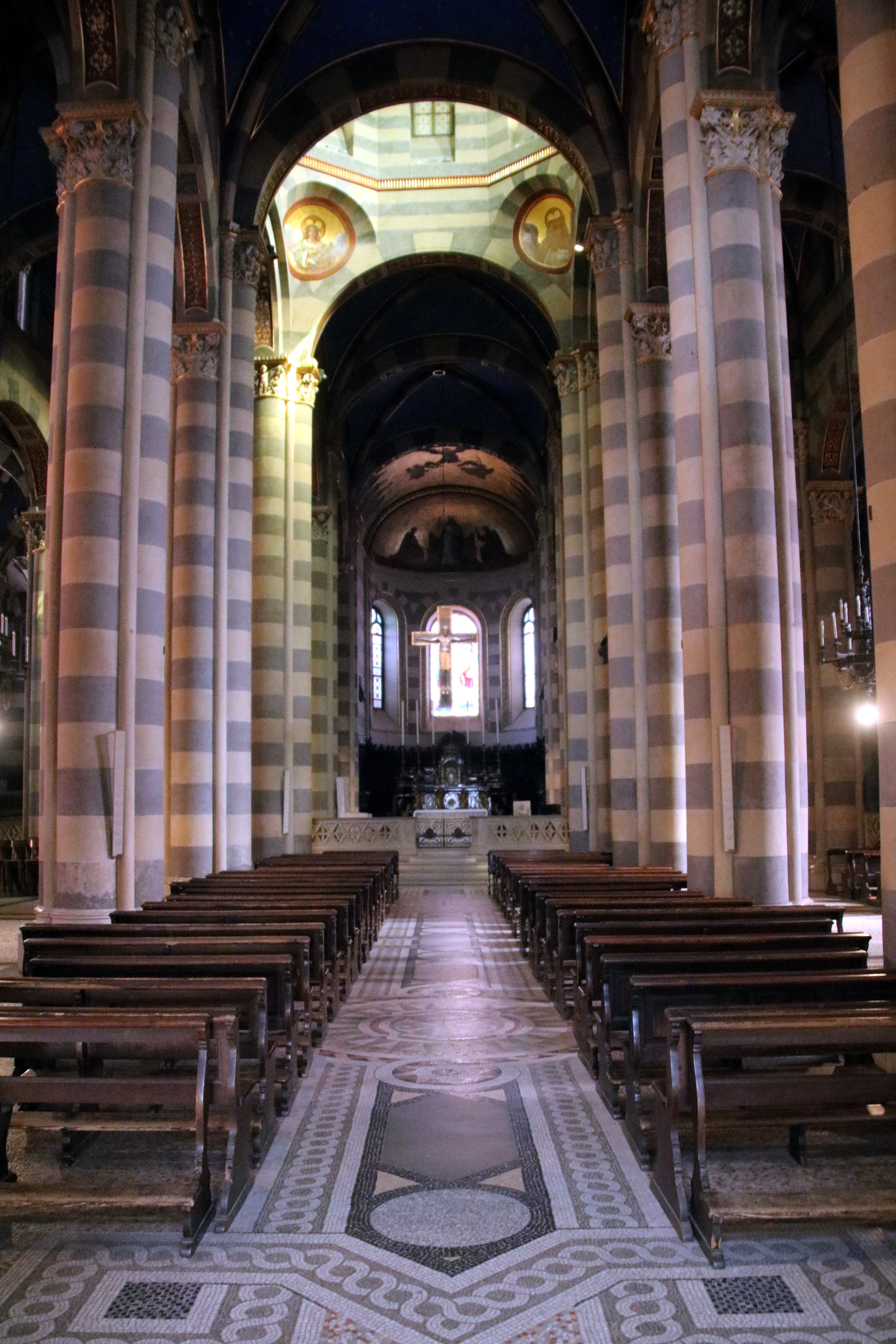 duomo di Sant'Evasio This is a photo of a monument which is part of cultural heritage of Italy.